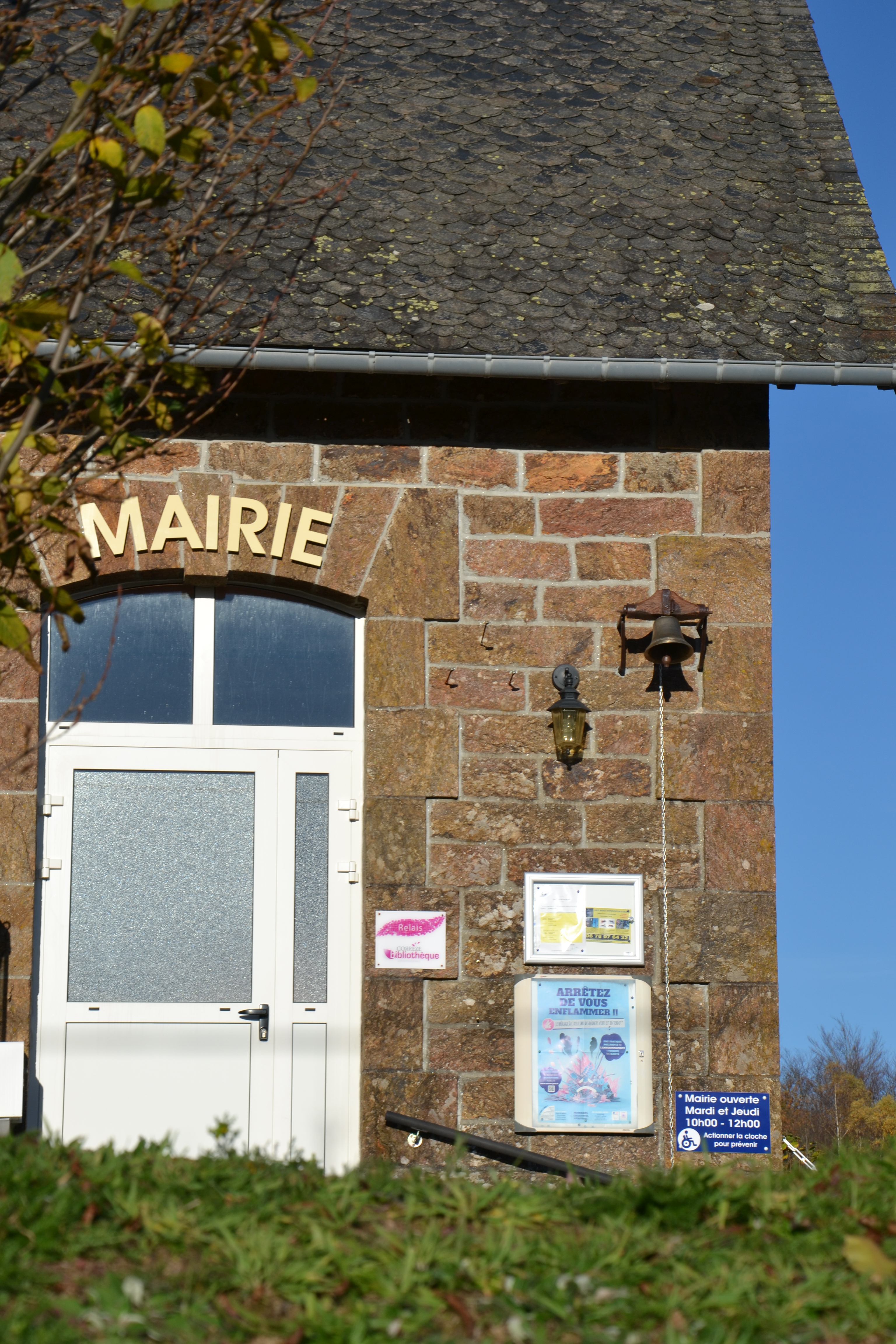 Vue sur la façade de la mairie de la commune de Le Jardin